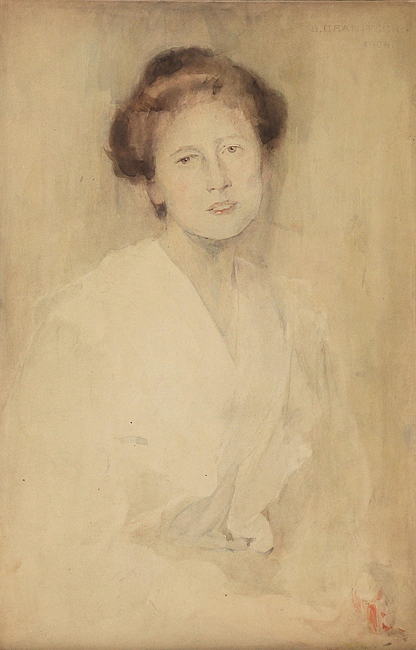 Bildnis einer Frau mit nach links geneigtem Kopf, signiert und datiert S. Granitsch 1904, Aquarell auf Papier auf Karton, 26 x 17 cm